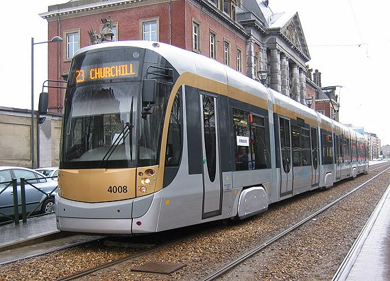 Een tram op de Brusselse tramlijn 23. Brussels tram route 23 at VUB (former Deuxième Lanciers) towards Churchill